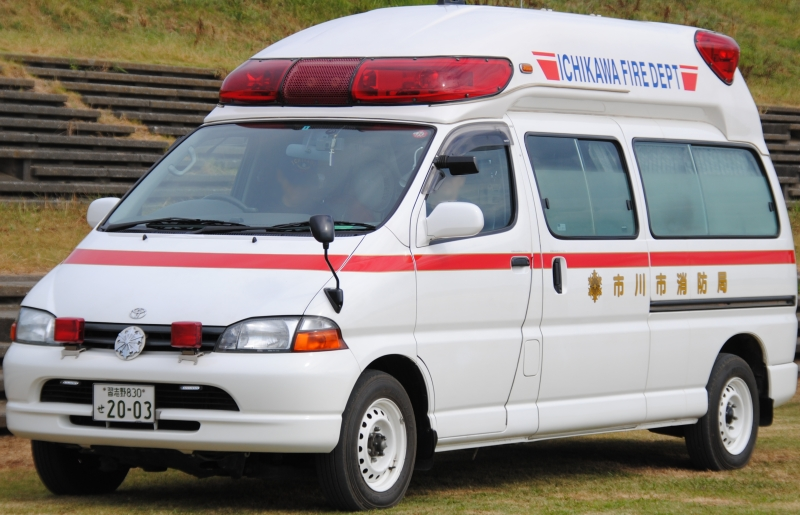 市川市消防局の救急車